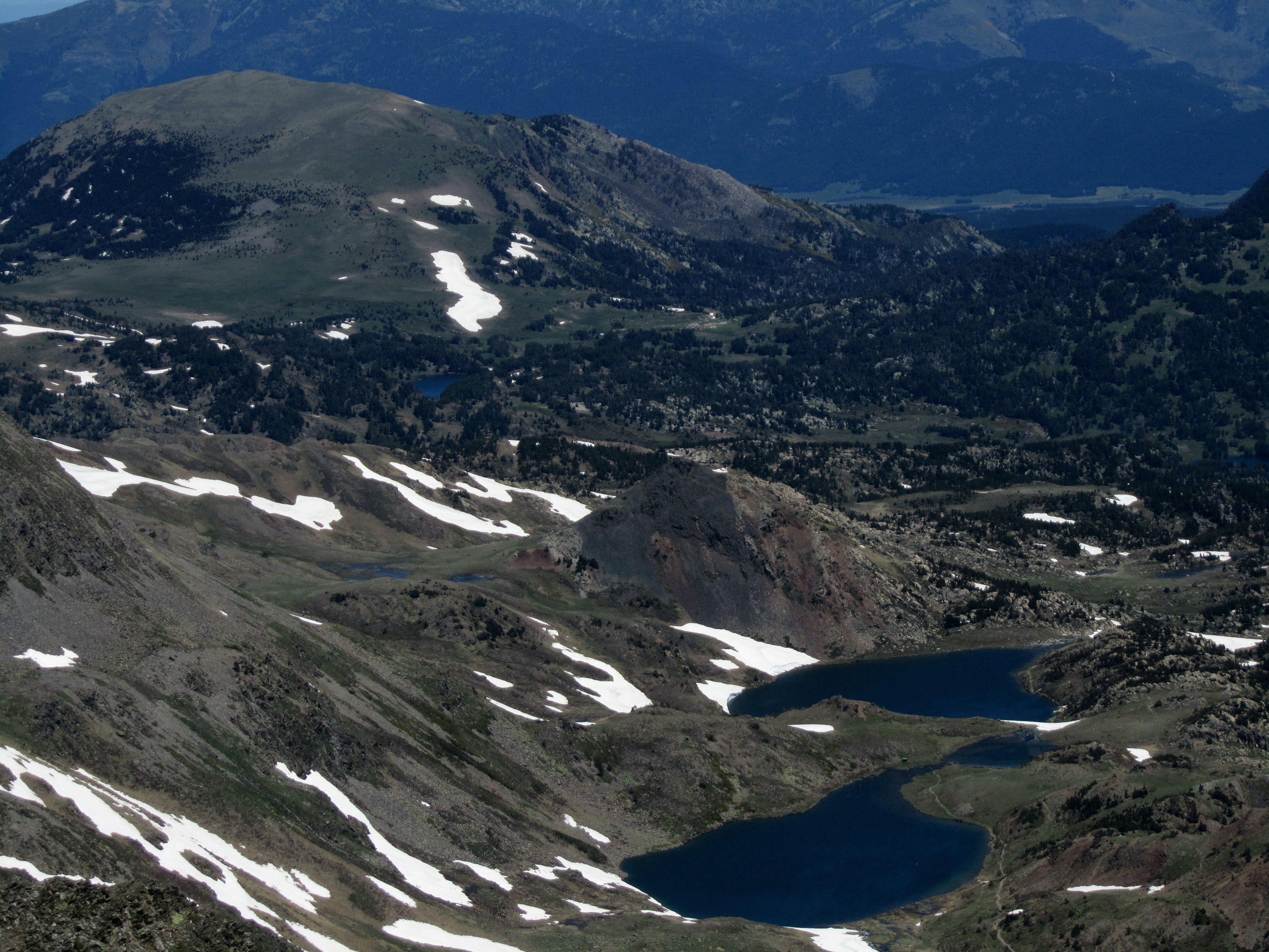 Au premier plan l'étang de Trebens qui découle dans l'étang d'en Gombau. Au second plan vue sur l'étang de Castellà.